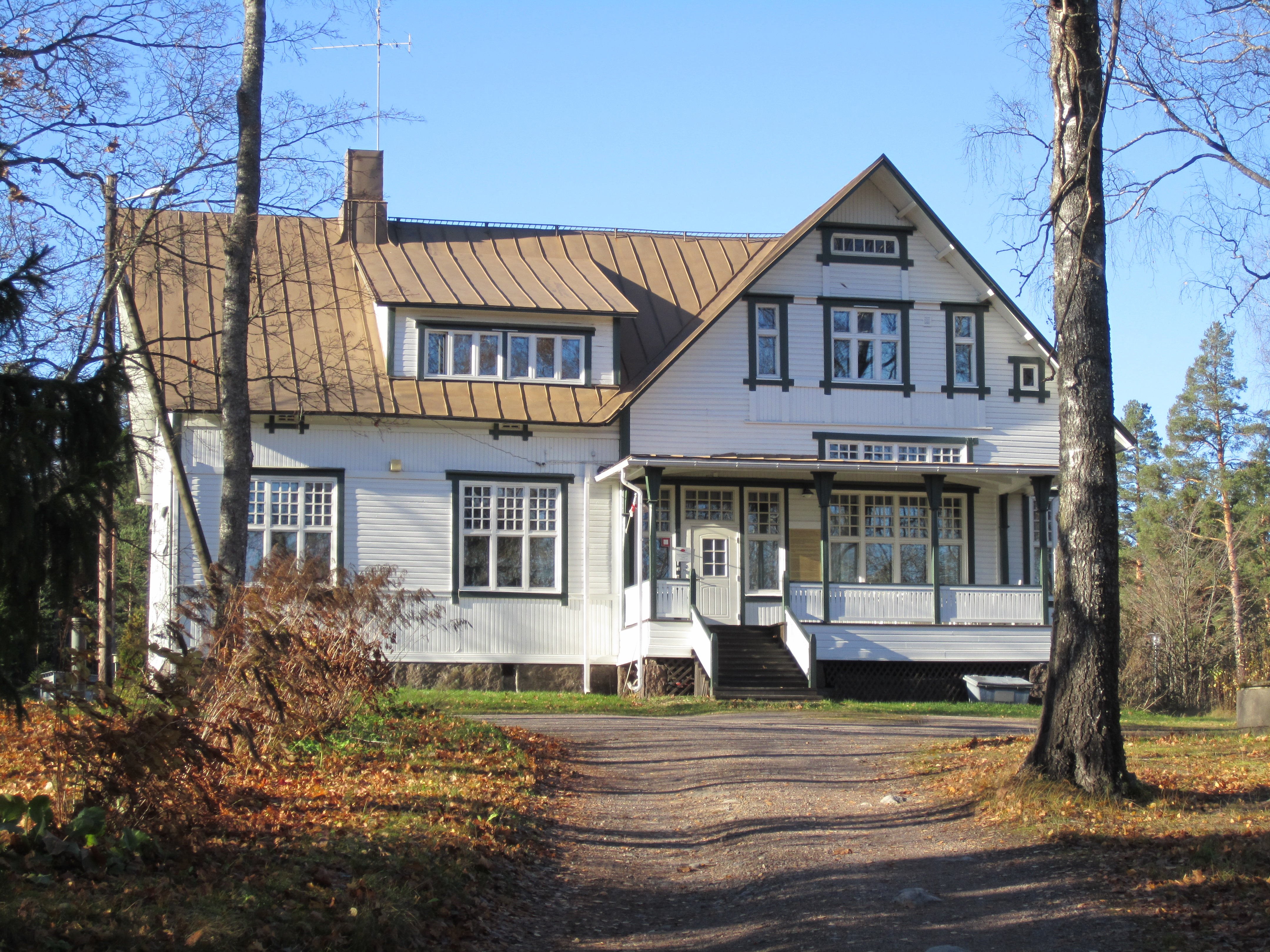 Rekolan kartanon vuonna 1880 valmistunut päärakennus, Vantaa